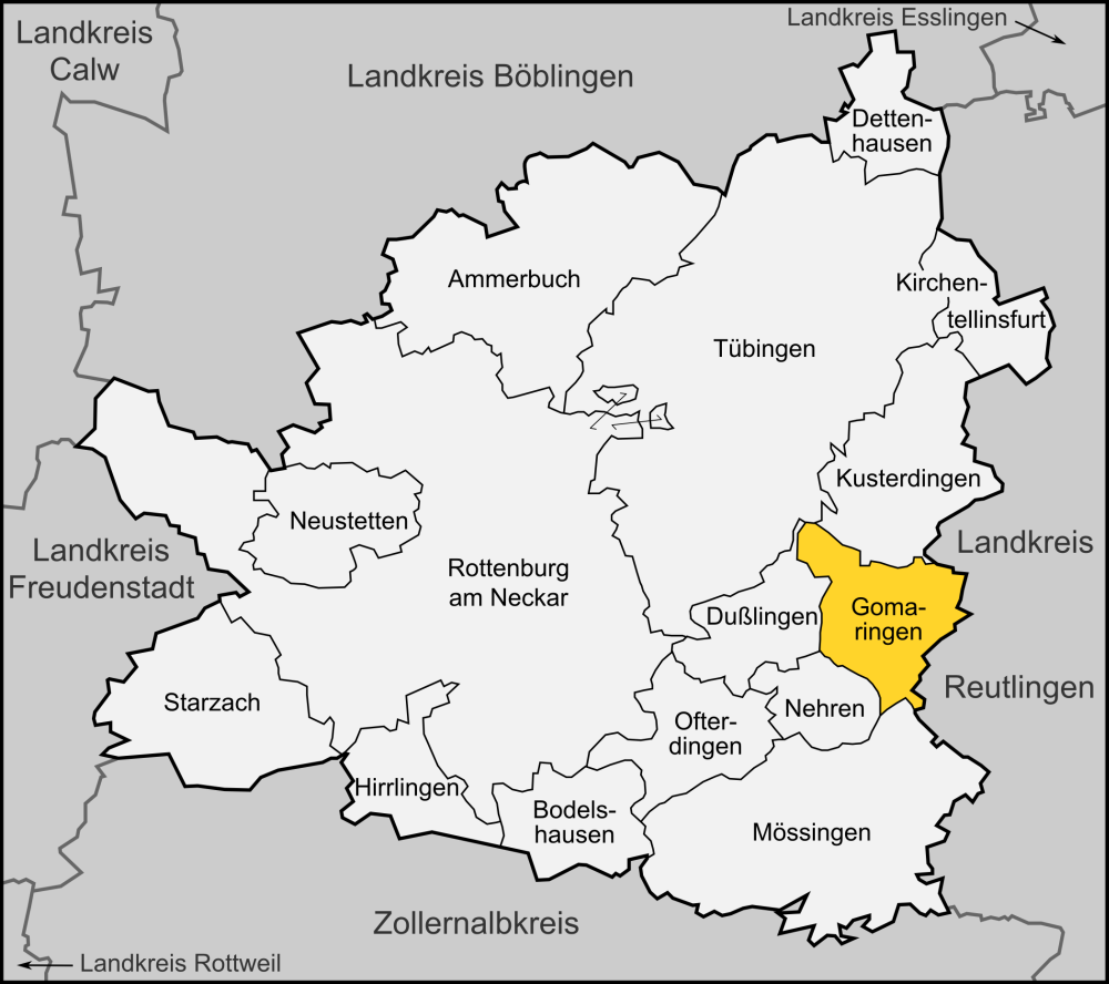 Karte der Gemeinde Gomaringen im Landkreis Tübingen